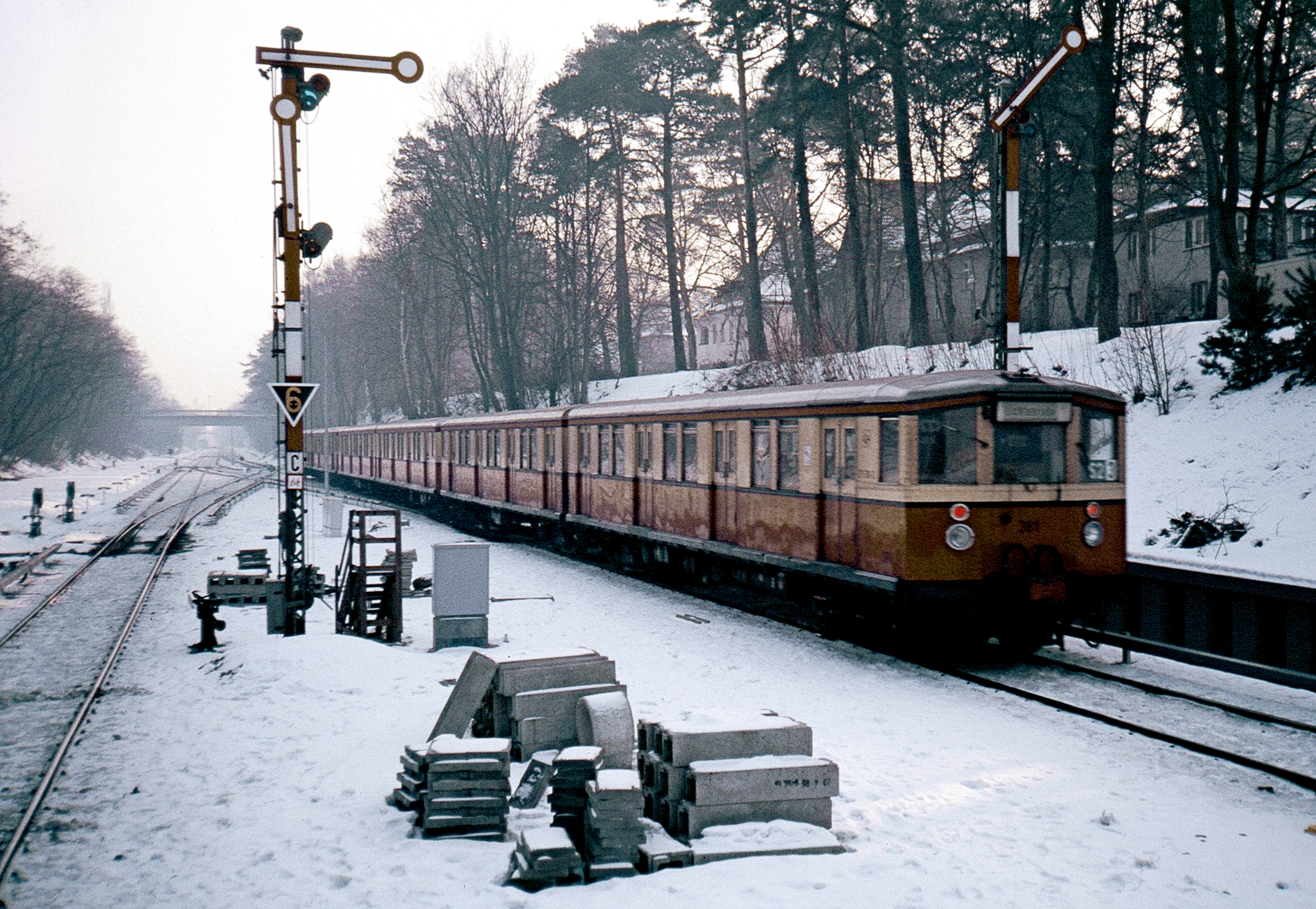 Bahnhof Berlin-Frohnau mit in Richtung Zentrum ausfahrendem S-Bahn-Zug der BVG